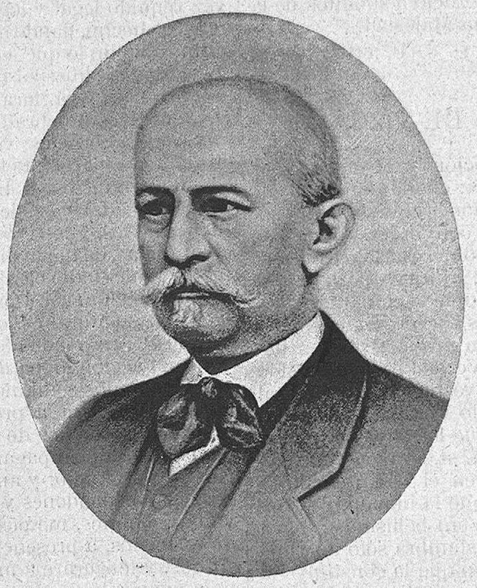 José Díez de la Cortina y Cerrato